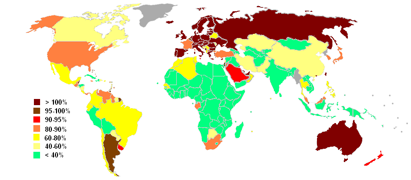 Mobile subscription penetration 2007